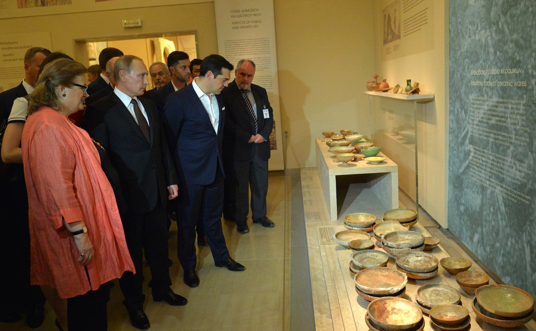 Ο Πούτιν στην Αθηνα